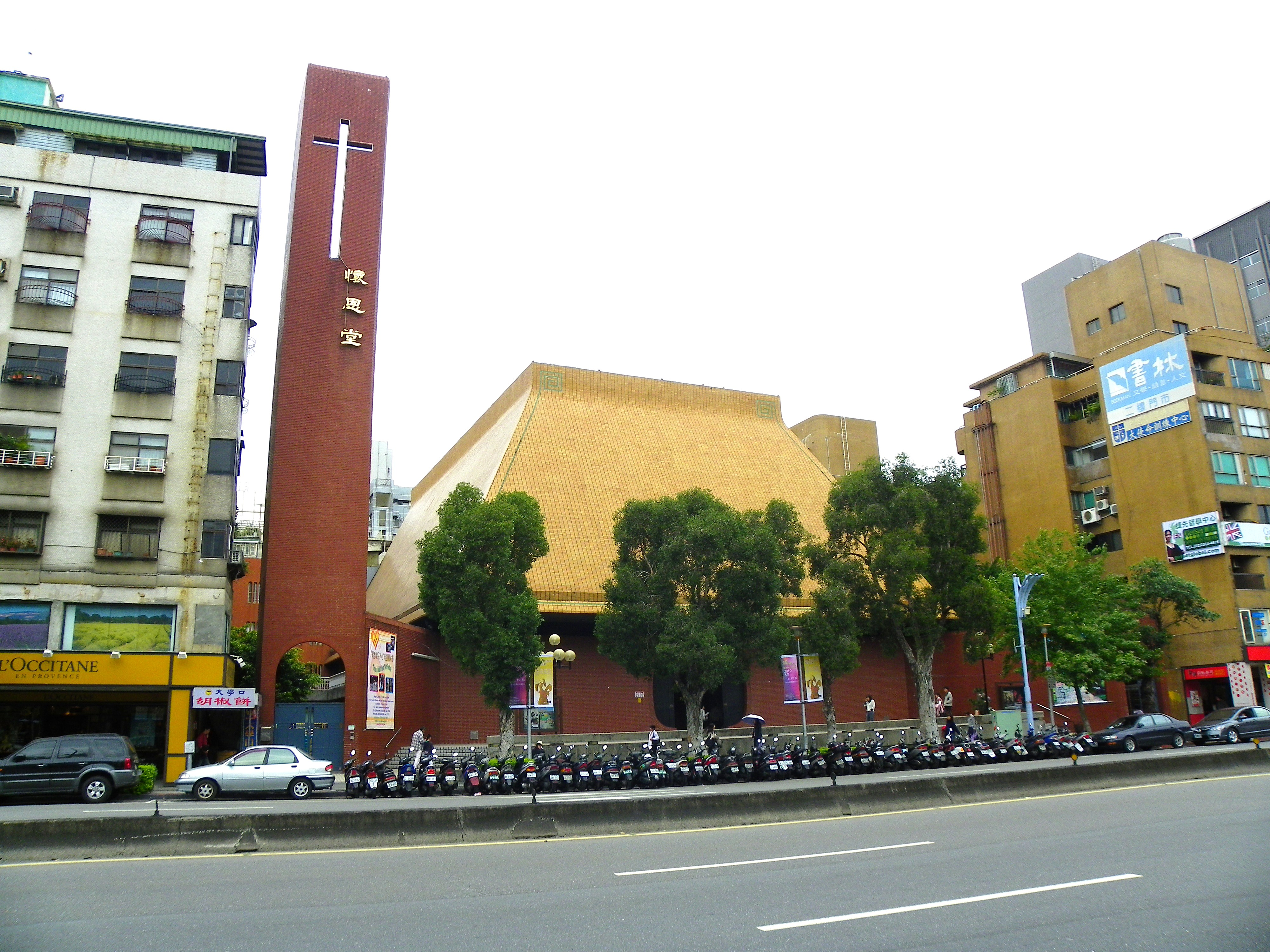 基督教浸信會懷恩堂，地址：106 臺北市大安區新生南路三段90號。